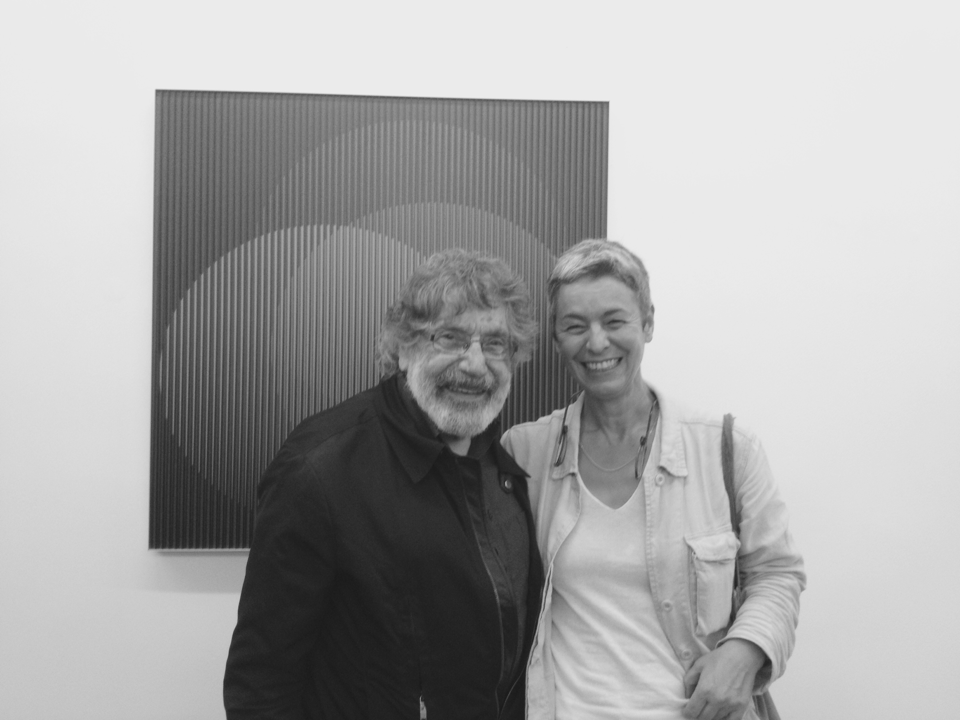 portrait